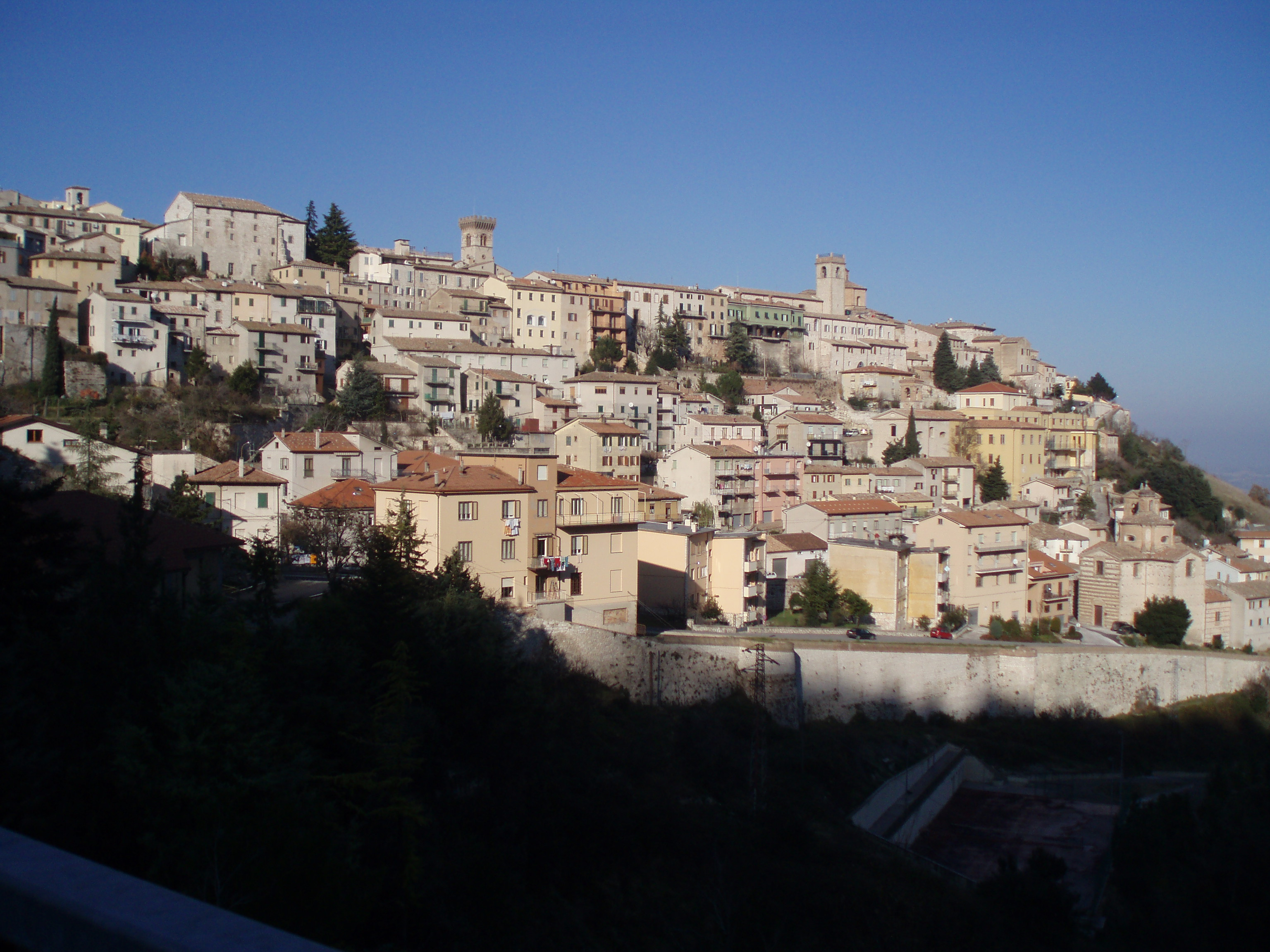 Vista di Arcevia - 1